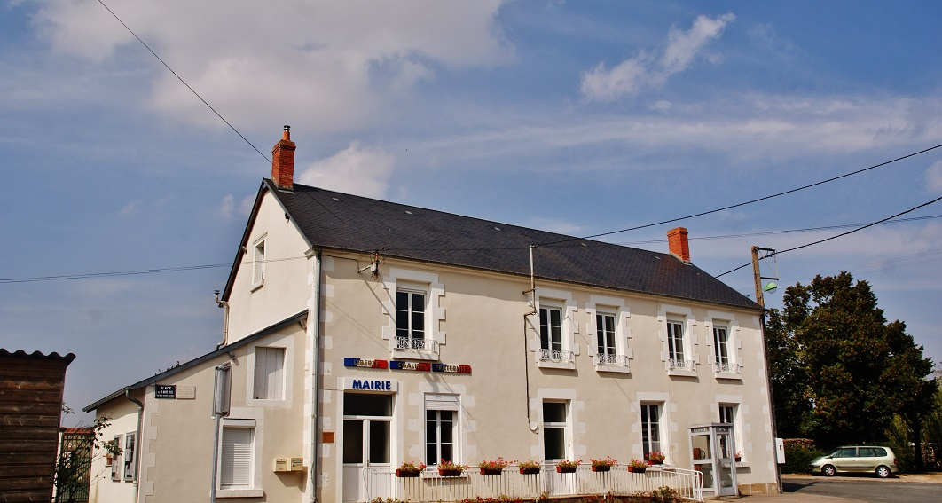 La Mairie